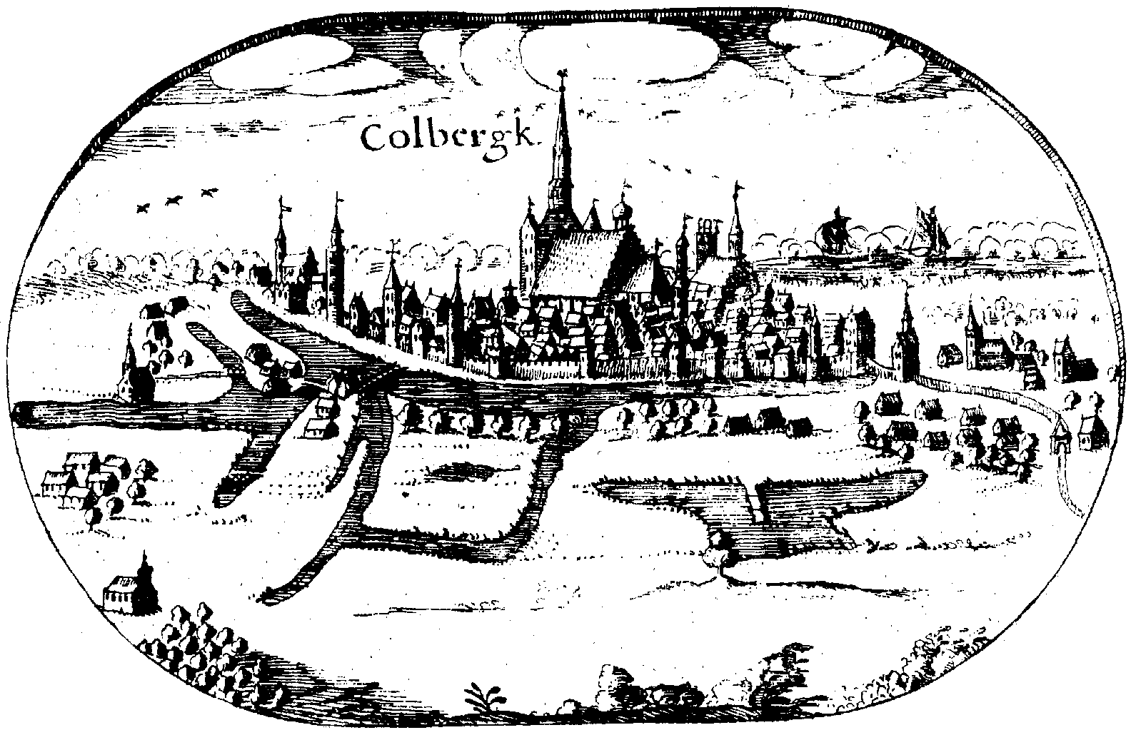 Rycina miasta Kołobrzeg z mapy Lubinusa - Mapa księstwa pomorskiego z 1618 roku.